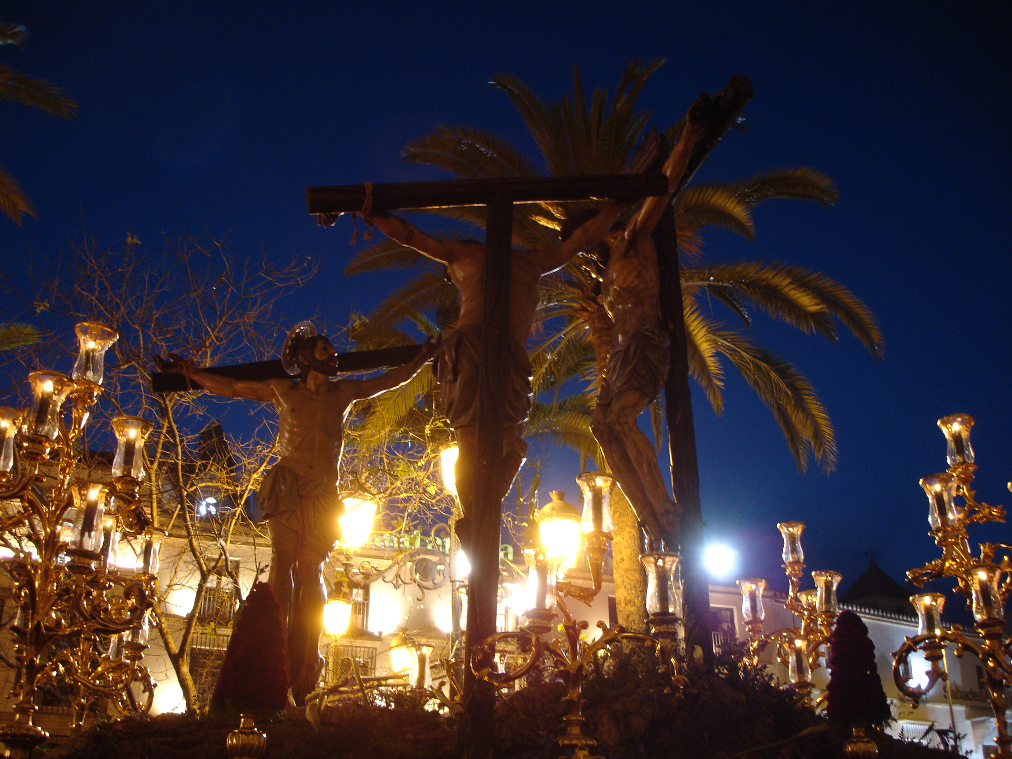 Vera Cruz, Jerez de la Frontera. Semana Santa (Easter) 2007